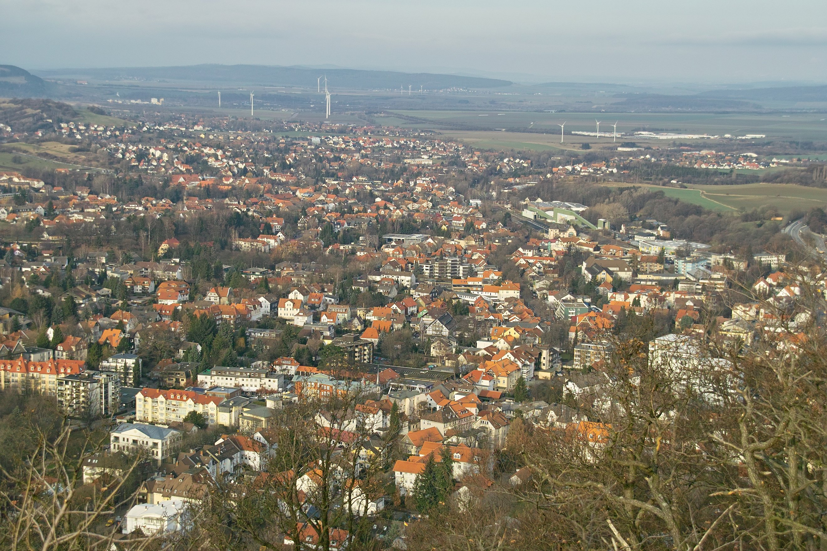 Blick auf Bad Harzburg vom Kleinen Burgberg